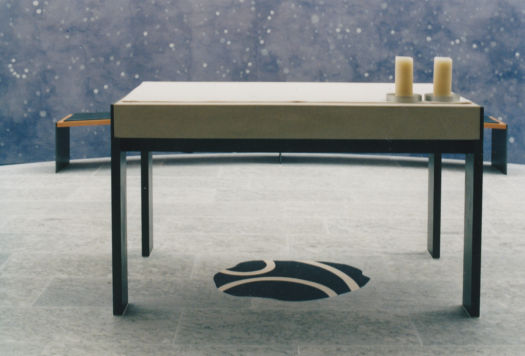 Römisch-katholische Pfarrkirche Hl. Dreifaltigkeit Zollikon, Altar